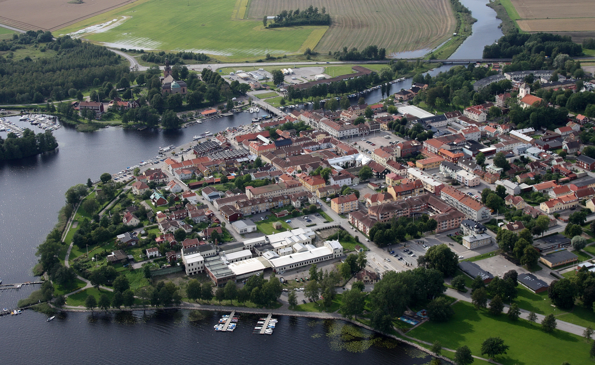 Askersund från luften